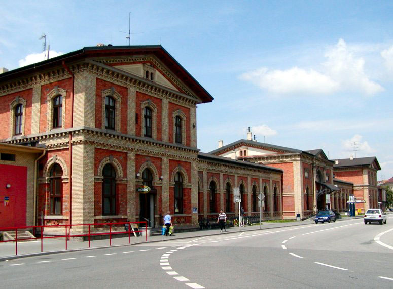 Railway station in Český Těšín (Czeski Cieszyn)